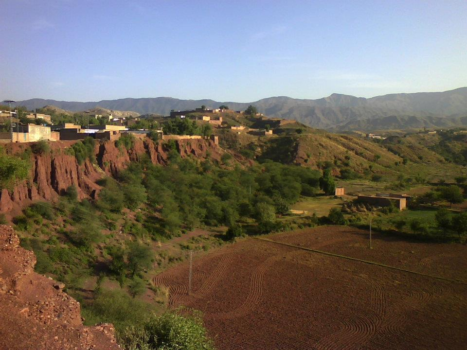 Beautiful view, Dak Ismail khel